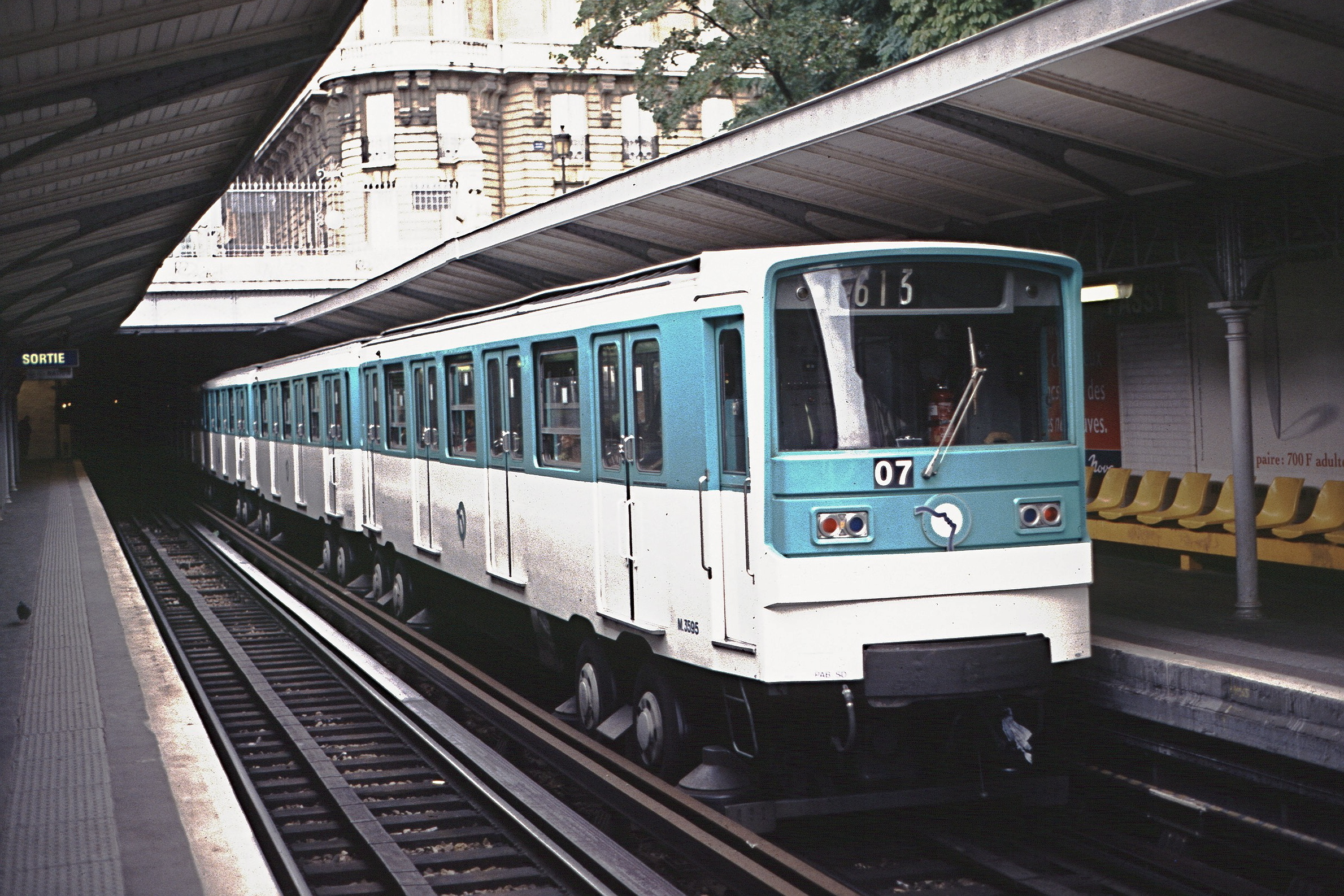 Paris Métrostation Passy